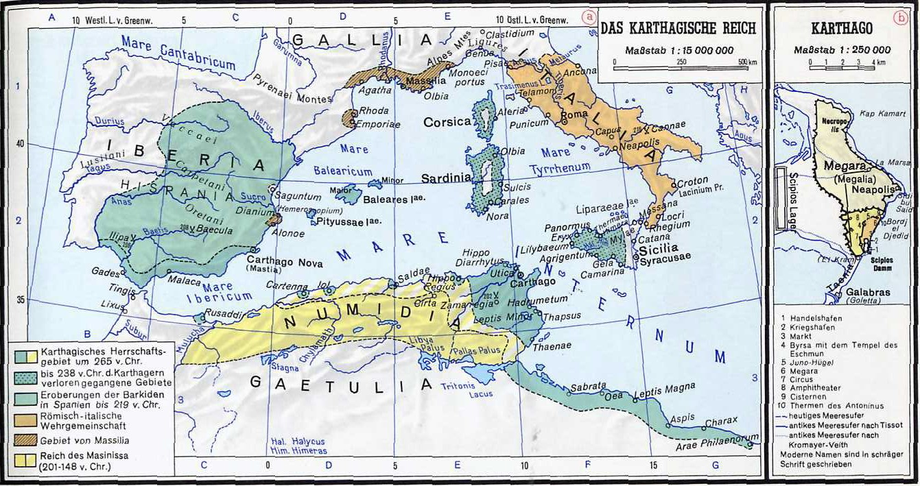 Mapa de Numidia.